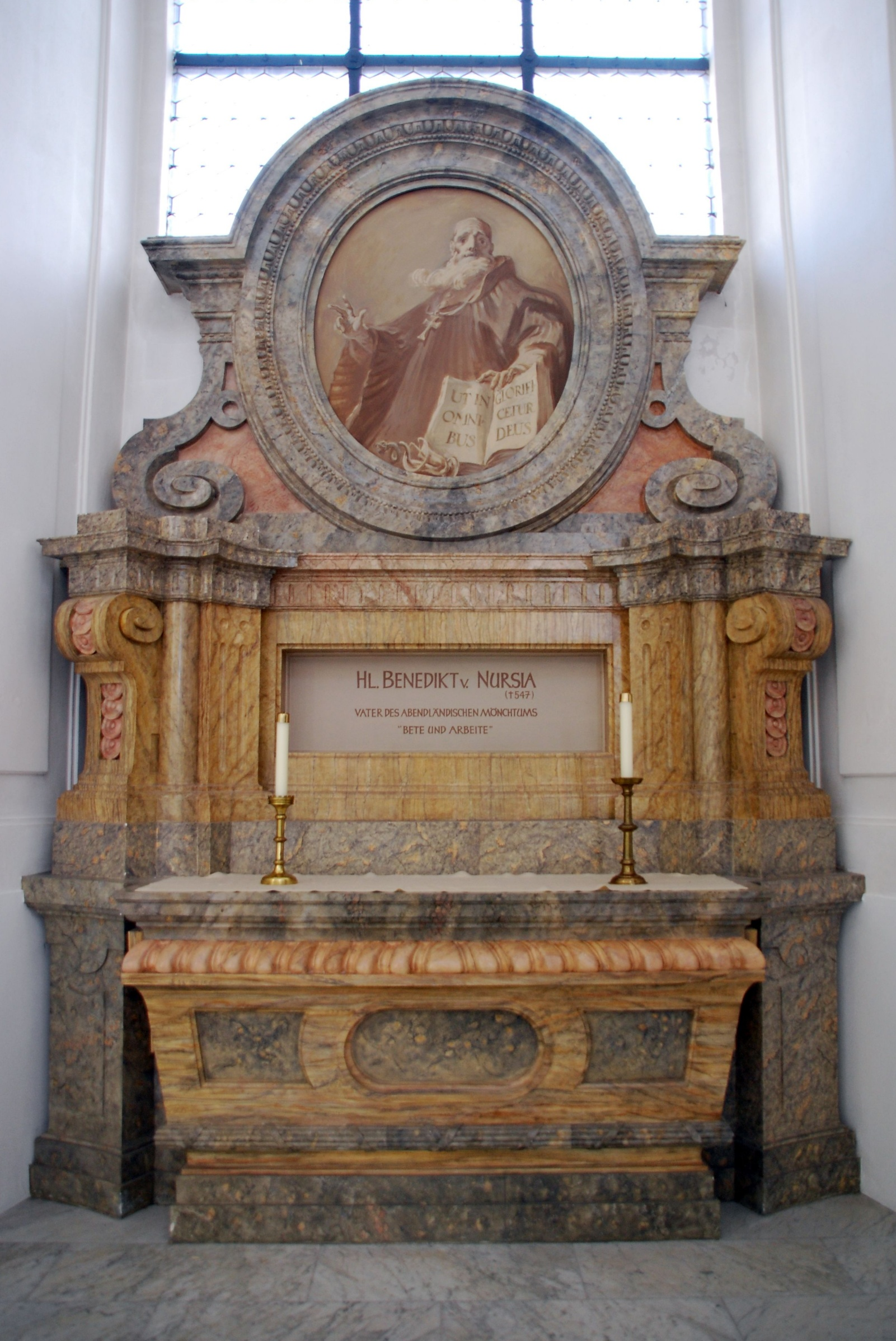 Seitenaltar mit dem Bildnis des Heiligen Benedikt im Dom St. Blasien